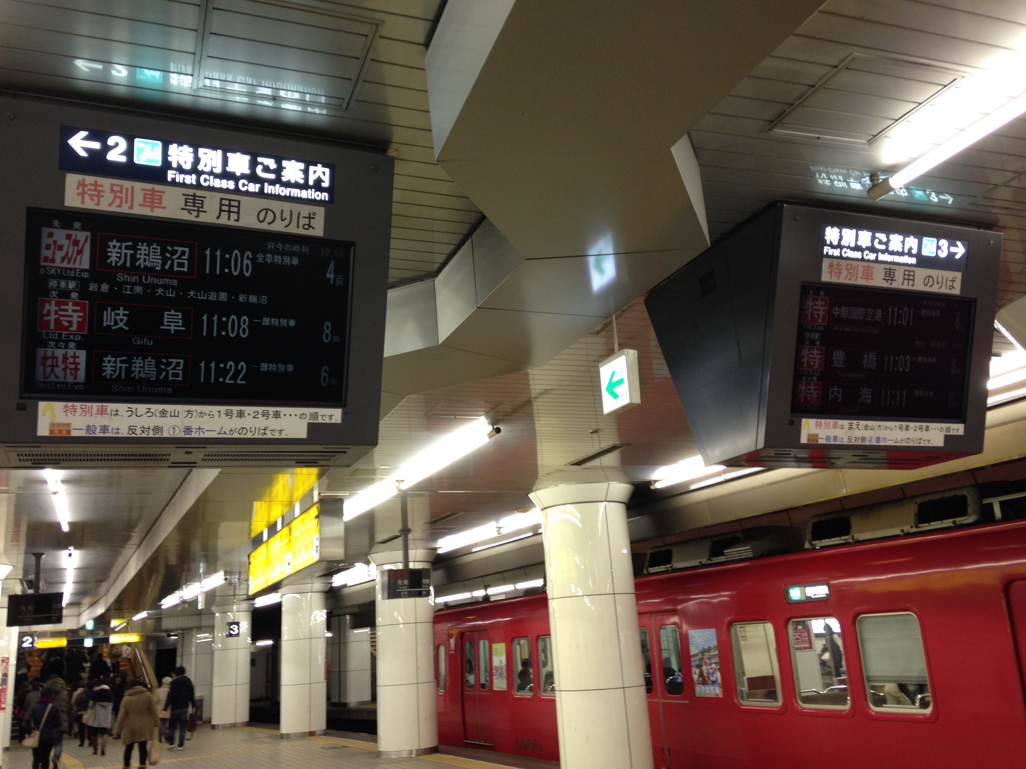 名鉄名古屋駅のホームにある発車標